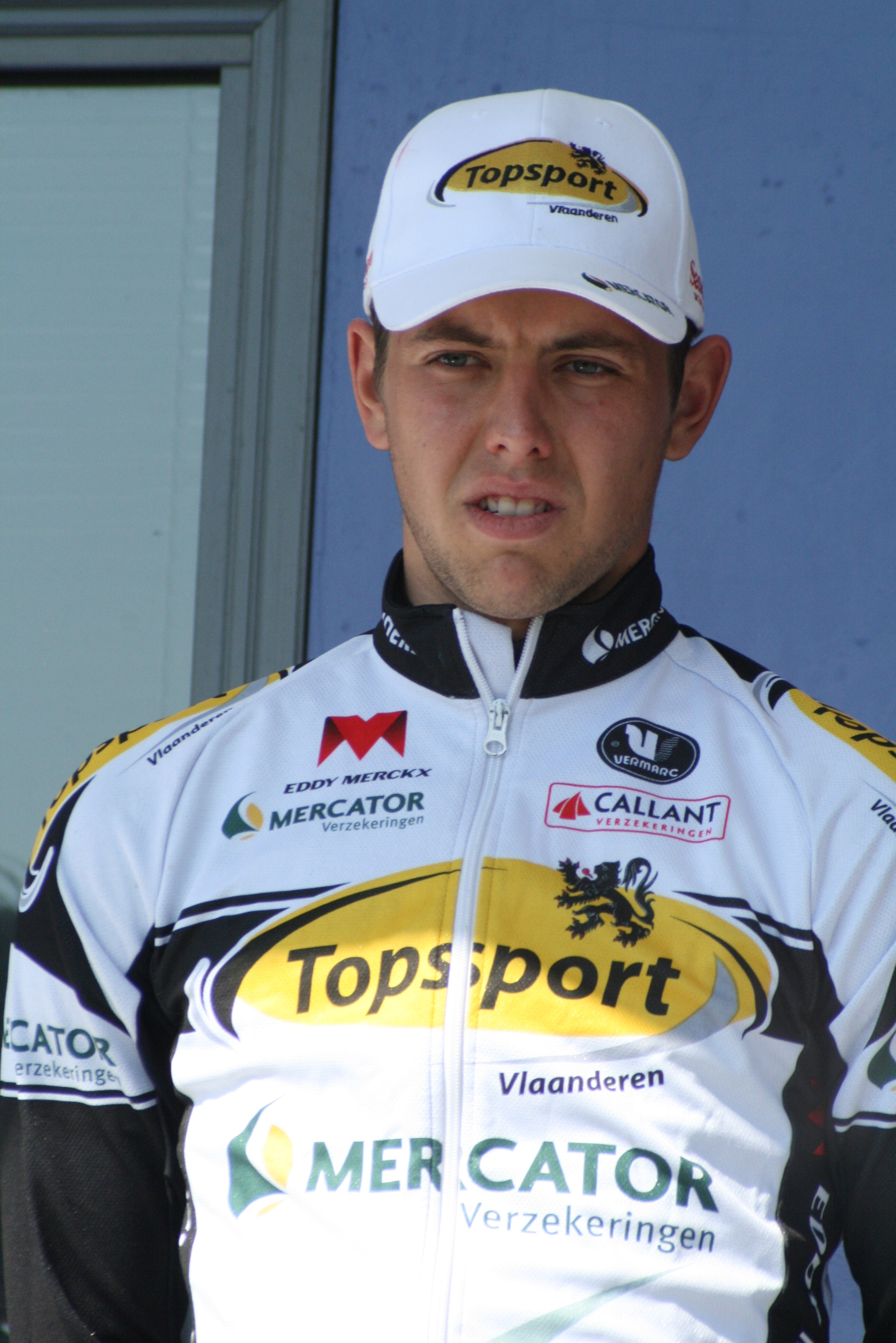 Présentation des coureurs au départ de la première étape Sven Jodts